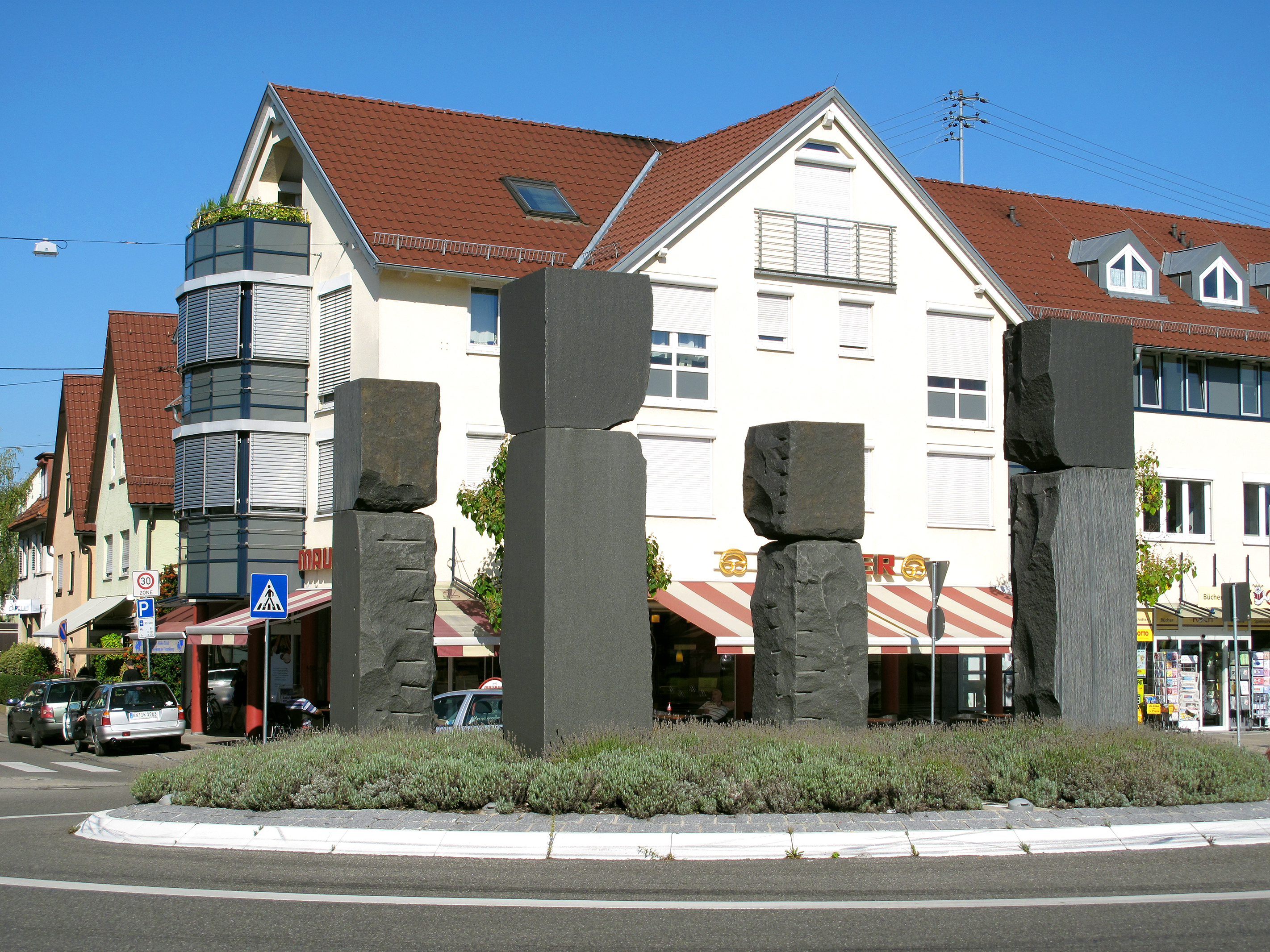 Ernst Günter Herrmann, Kreisverkehr + 4 Säulen, 2009, - Deutschland, Baden-Württemberg, Schwaikheim, Bahnhofstraße